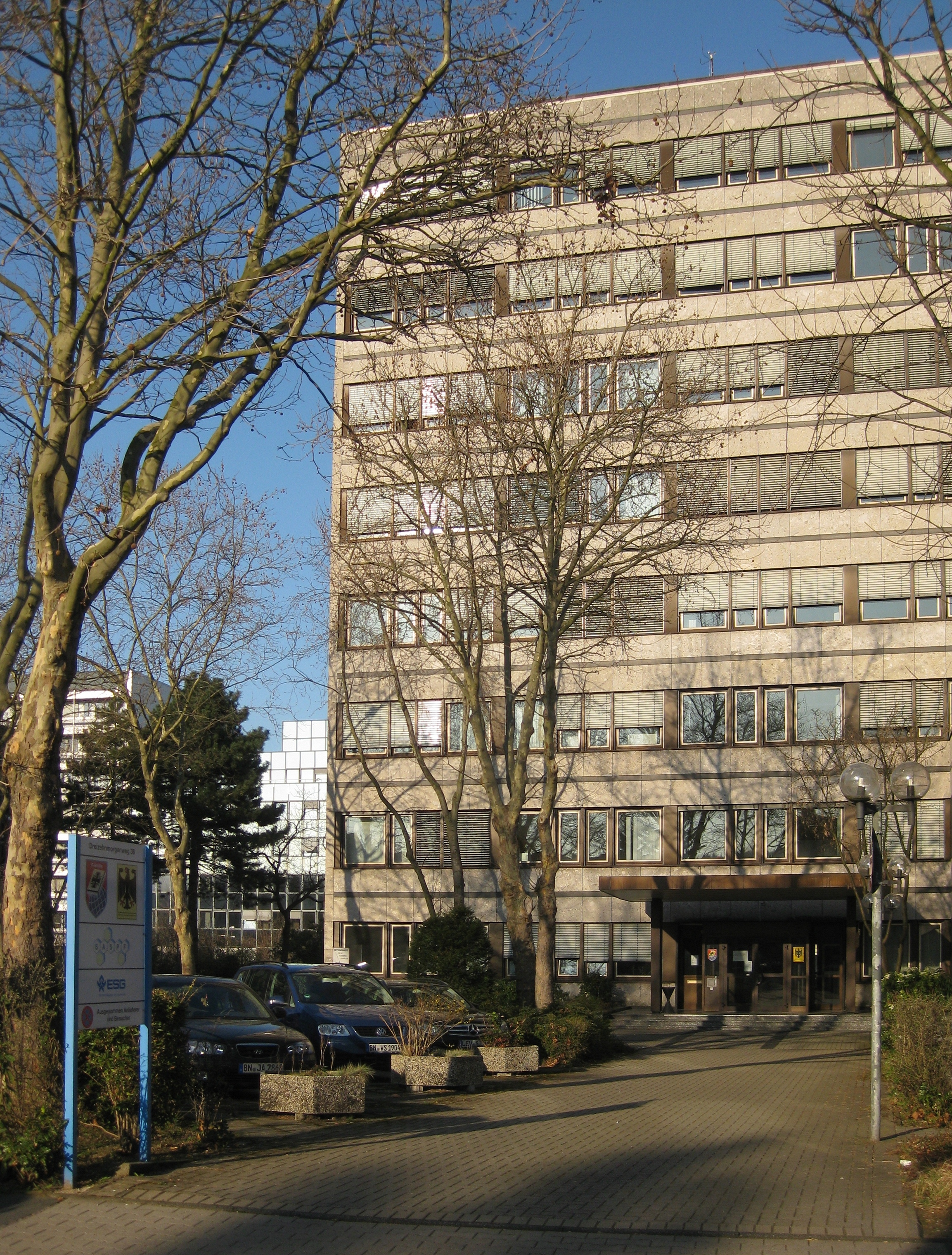 Deutschland, Bonn: Zweigstelle des (ehemaligen) Bundesamts für Informationsmanagement und Informationstechnik der Bundeswehr (IT-AmtBw)